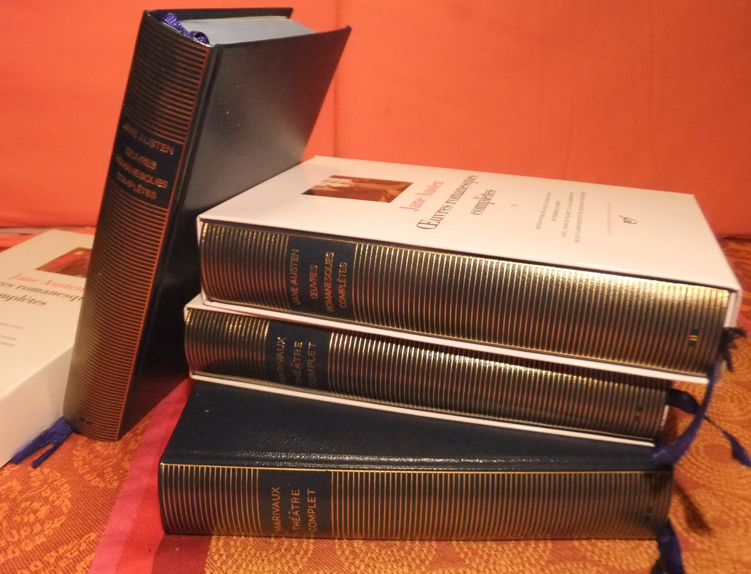 La Pléiade a choisi de placer Jane Austen parmi les auteurs du XVIIIe siècle (reliure, tranche supérieure et cordons marque-pages bleus). Ici les deux volumes des oeuvres romanesques complètes et les deux du théâtre de Marivaux.